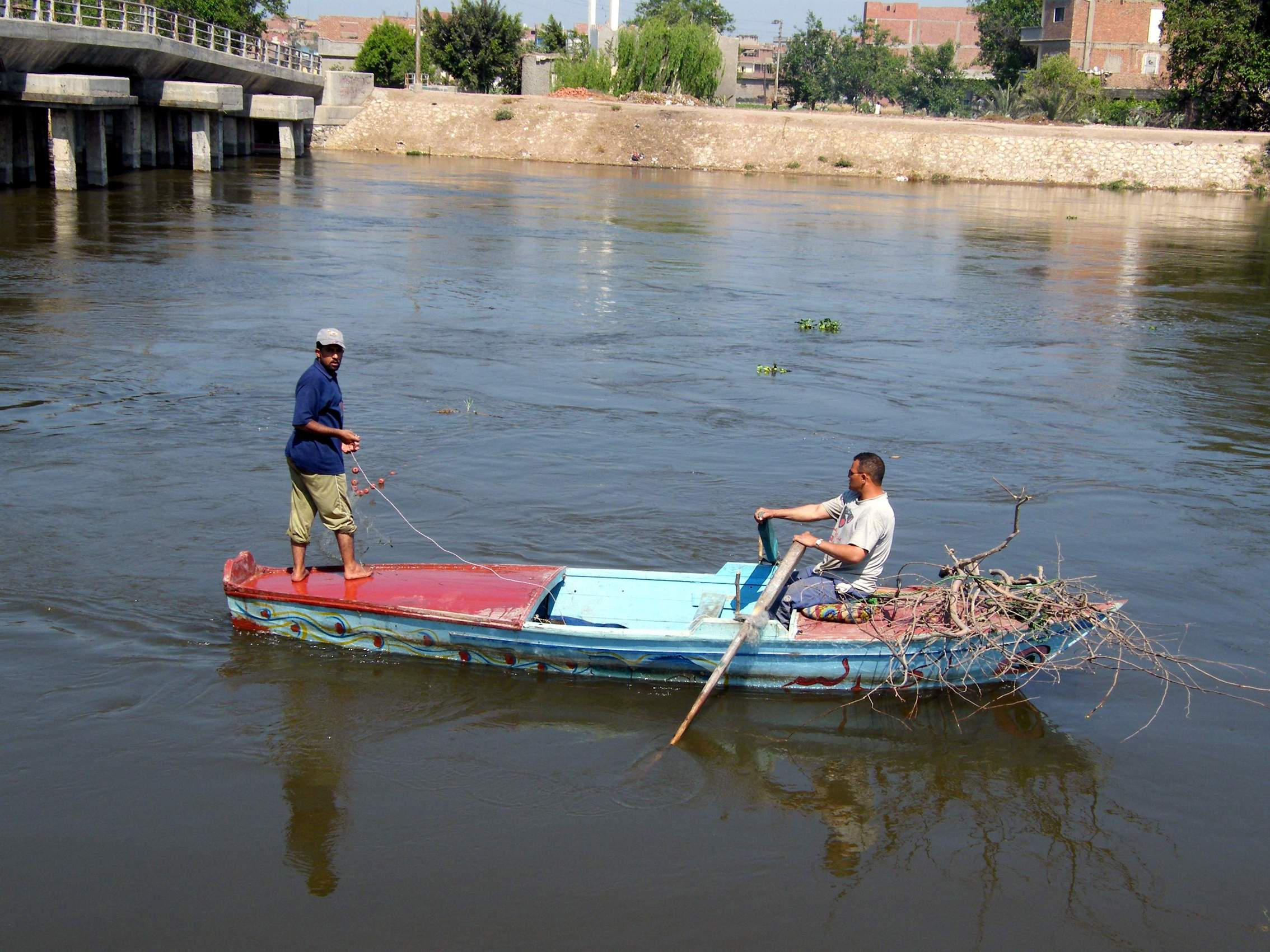 Shubra Melkan, Al Mahalah Al Kubra, Gharbia Governorate, Egypt